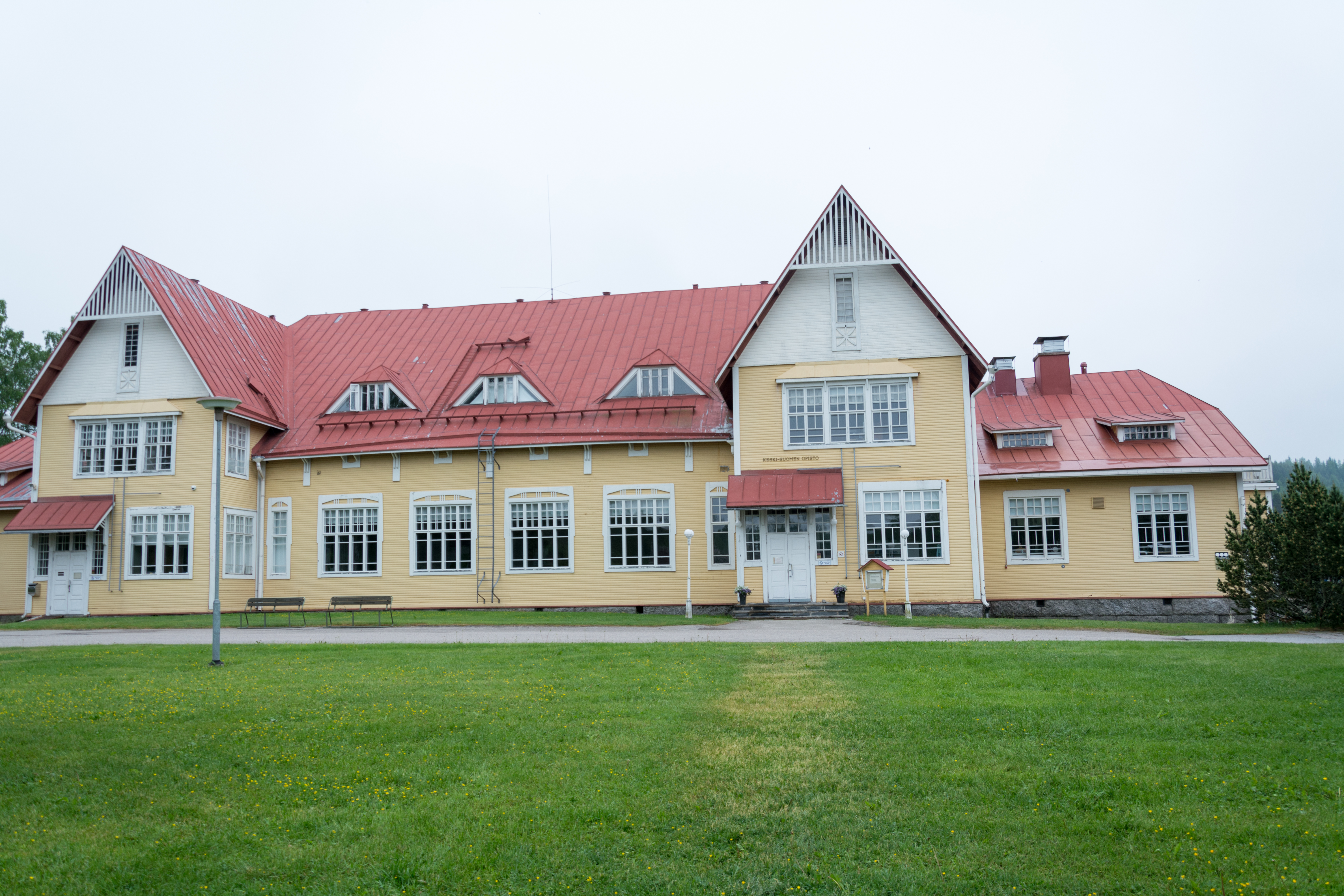 Keski-Suomen Opisto Suolahdella